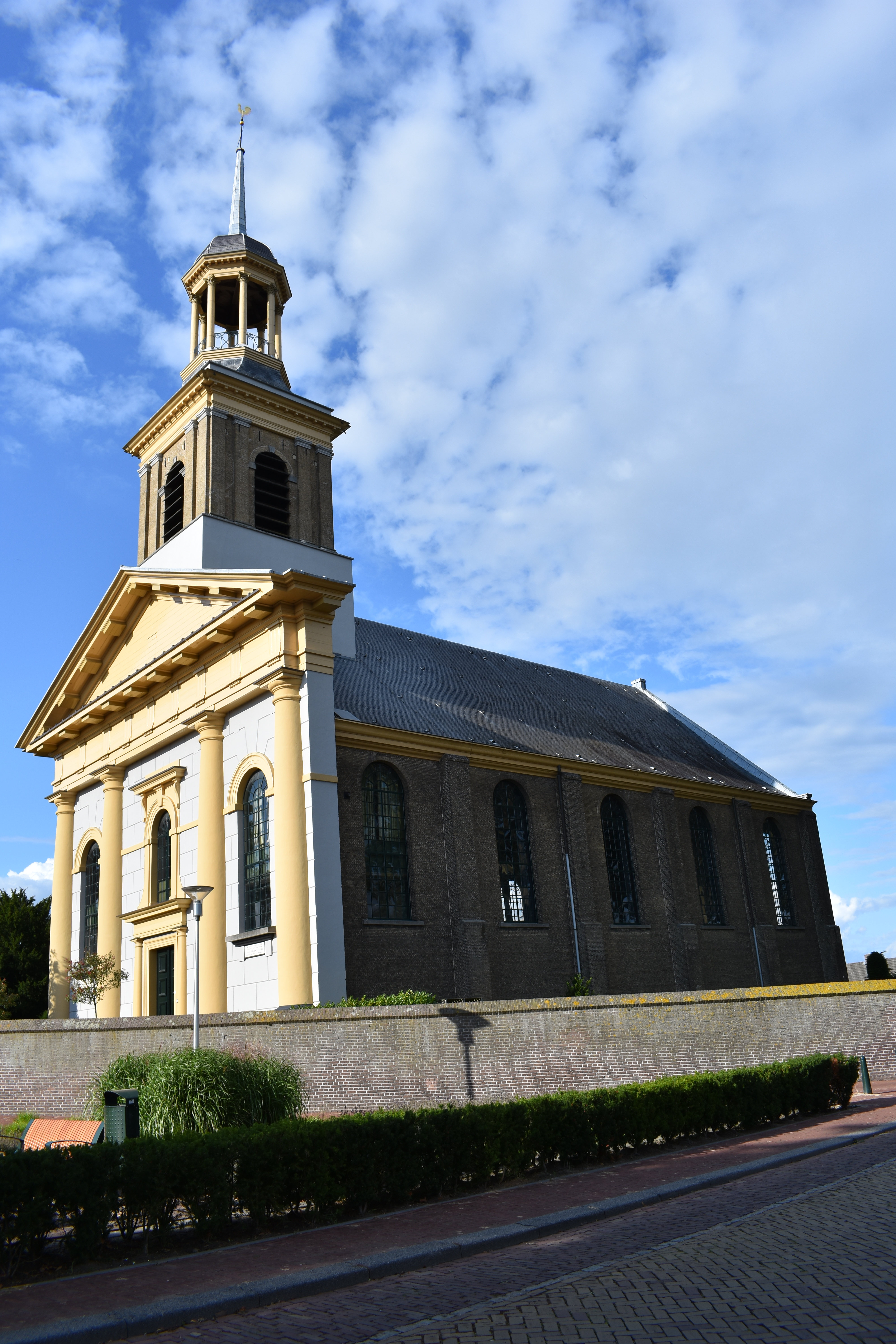 Protestantse Kerk, Kerkplein 7, Steenbergen Wikidata has entry Q2262660 with data related to this item.